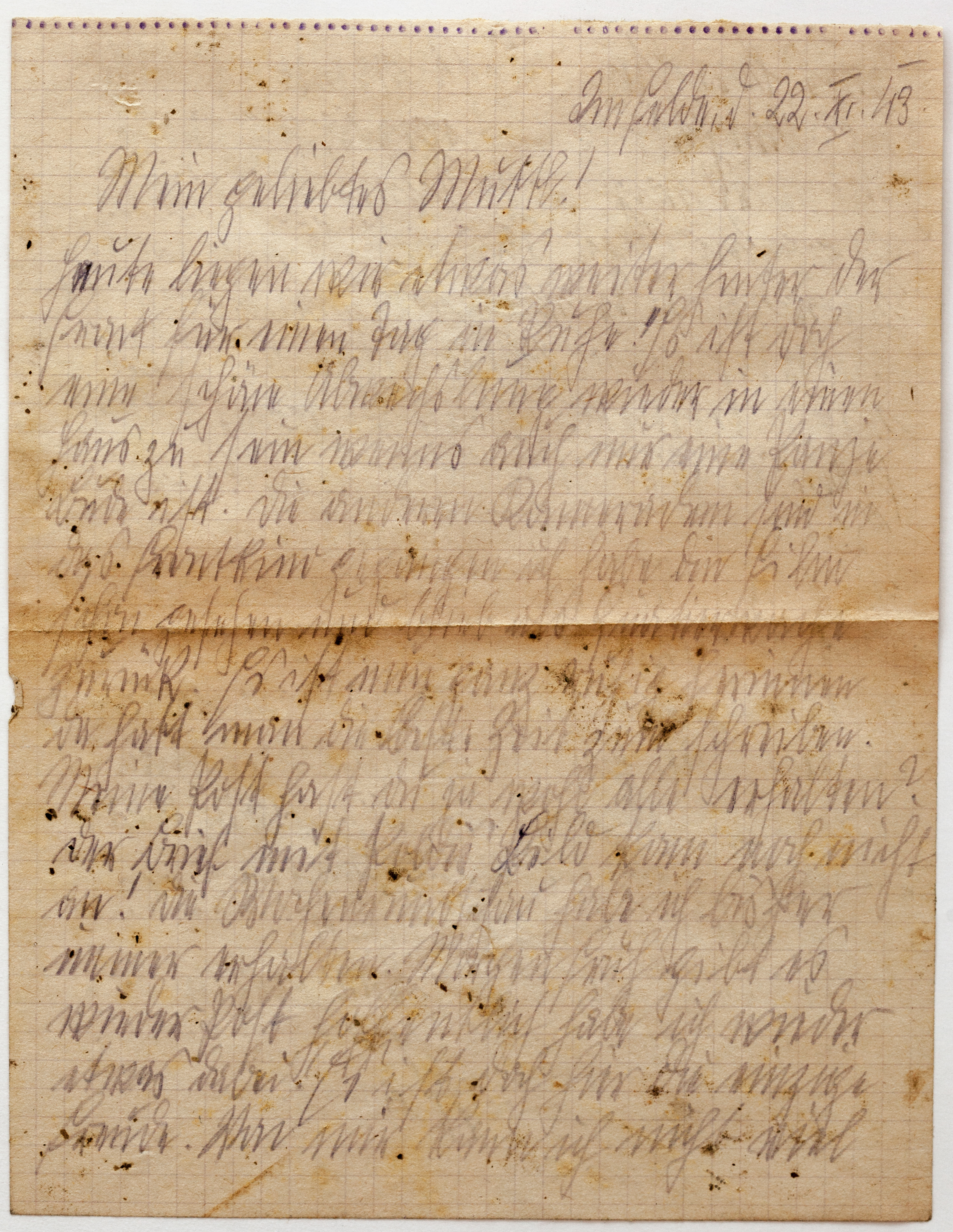 Feldpostbriefe von Hans Koch, Wien, 2. Weltkrieg, Ostfront, 1922-1945 vorheriger Brief (1943-11-20) Brief Nr. 208 (1943-11-22) nächster Brief (1943-11-24) Briefumschlag: Vorderseite Rückseite: LEER Brief: Seite 1 Seite 2 TEXT Im Felde, d. 22.XI.43. Mein geliebtes Muttl! Heute liegen wir etwas weiter hinter der Front für einen Tag in Ruhe! Es ist doch eine schöne Abwechslung wieder in einen Haus zu sein wenns auch nur eine Panje Bude ist. Die anderen Kameraden sind in das Frontheim gegangen ich habe den Film schon gesehen und bleib als Quatierwache zurück. Es ist nun ganz ruhig herinnen da hatt man die Zeit zum schreiben. Meine Post hast Du ja wohl alle erhalten? Der Brief mit Poldis Bild kam noch nicht an! Die Wochenrundschau habe ich bisher immer erhalten. Morgen Früh gibt es wieder Post hoffentlich habe ich wieder etwas dabei! Es ist doch hier die einzige Freude. Von mir kann ich nicht viel [Neues berichten.]